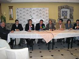 Imagen tomada en el último congreso celebrado por ADEIZA-UPZ en la ciudad de Zamora el 16 de diciembre de 2006.